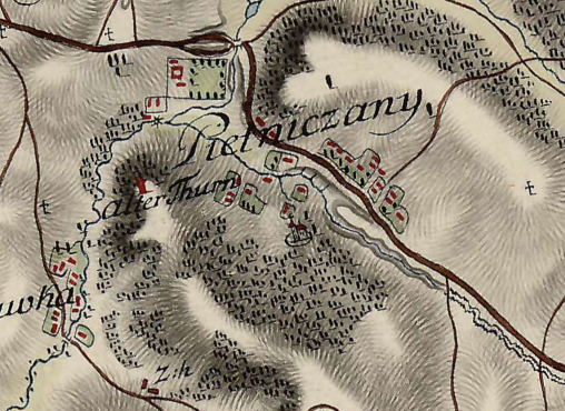 xviii